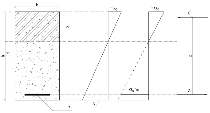 Schema grafico di sezione rettangolare (parzializzata) di una trave inflessa